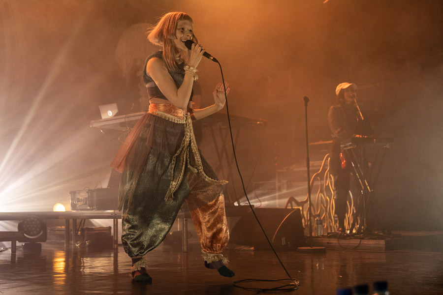 Aurora på scenen 22. mars 2019.